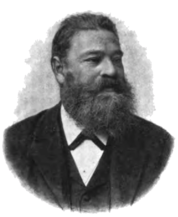 Michael Frankenstein (1843–1918), Austrian photographer